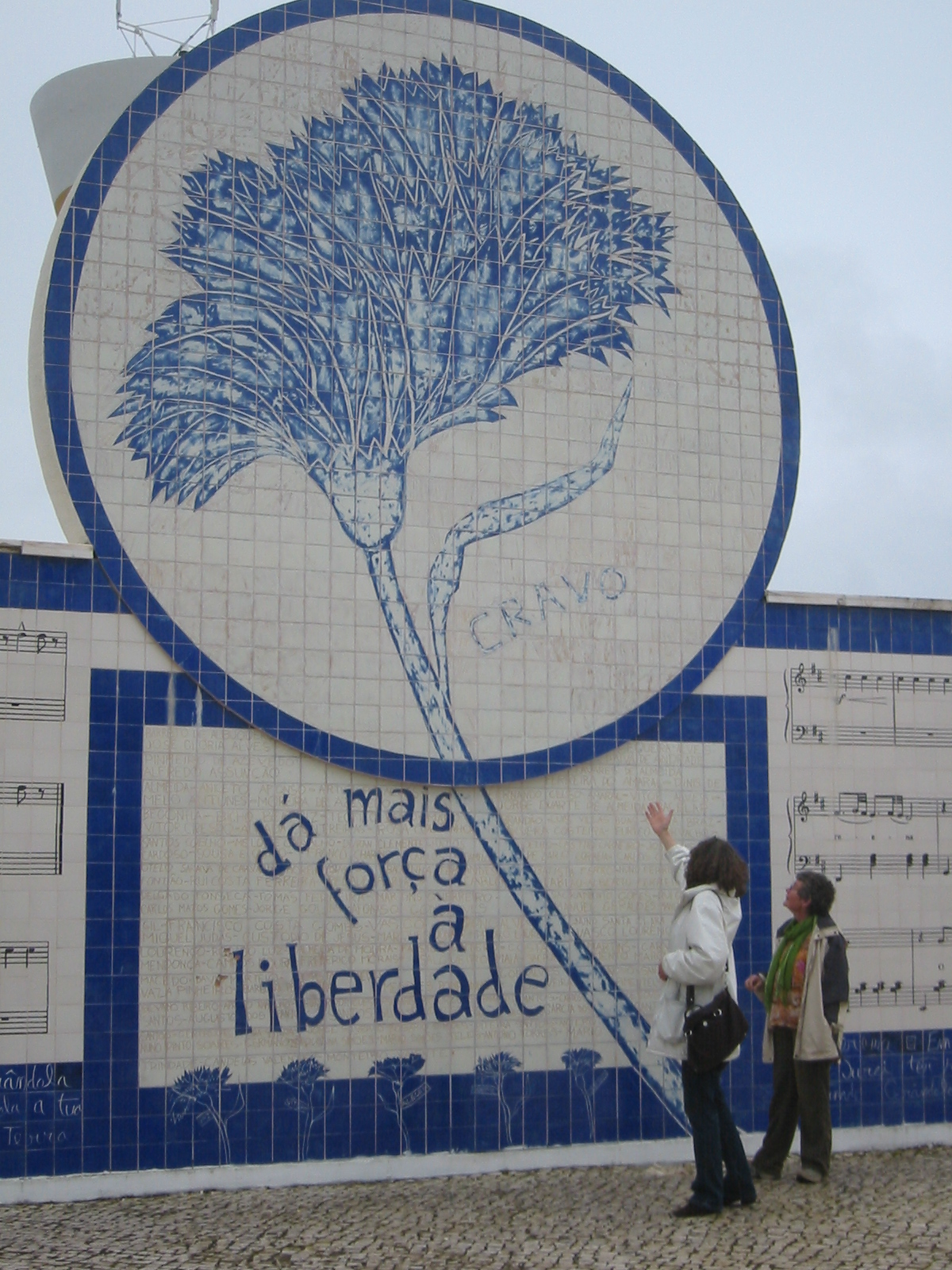 Monument in Grandola, made by Bartolomeu dos Santos, Zeca Alfoso, 24 April 1974